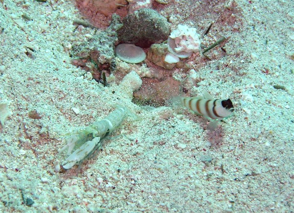 Steinitz' Partner Goby (Amblyeleortis steinitzi) with Snapping Shrimp Alpheus djeddensis (Egypt Summer 2005)